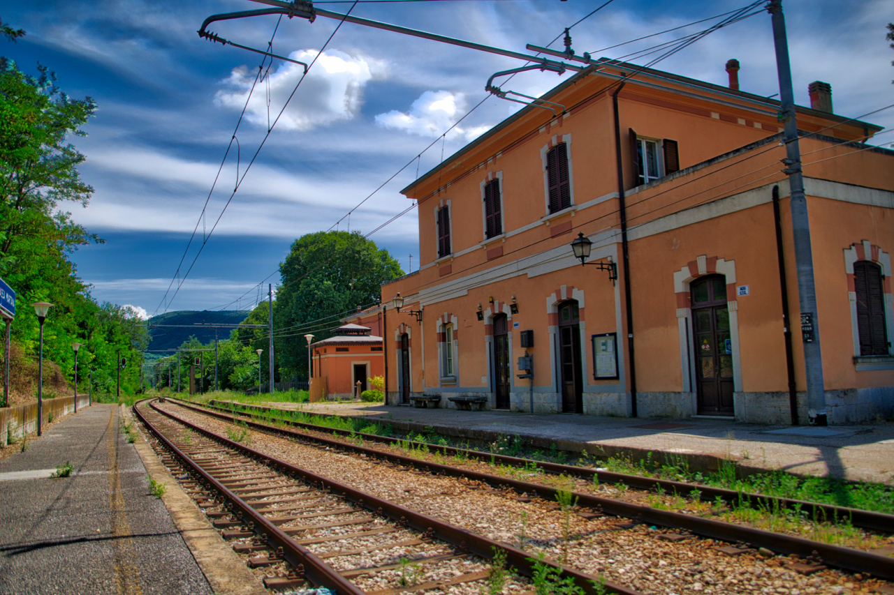 Foto Daniele Bartolucci